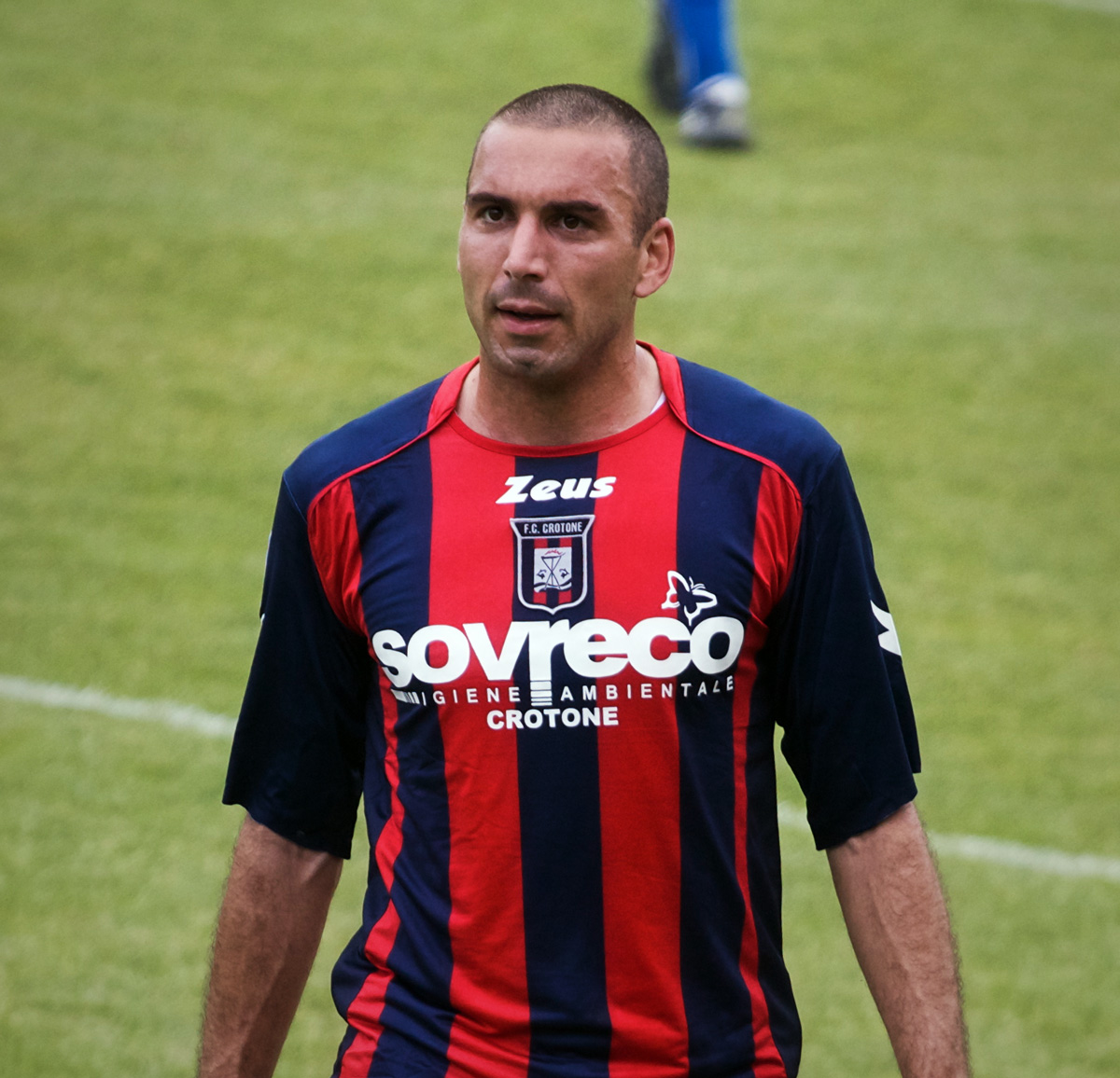 Primo piano di Giuseppe Abruzzese